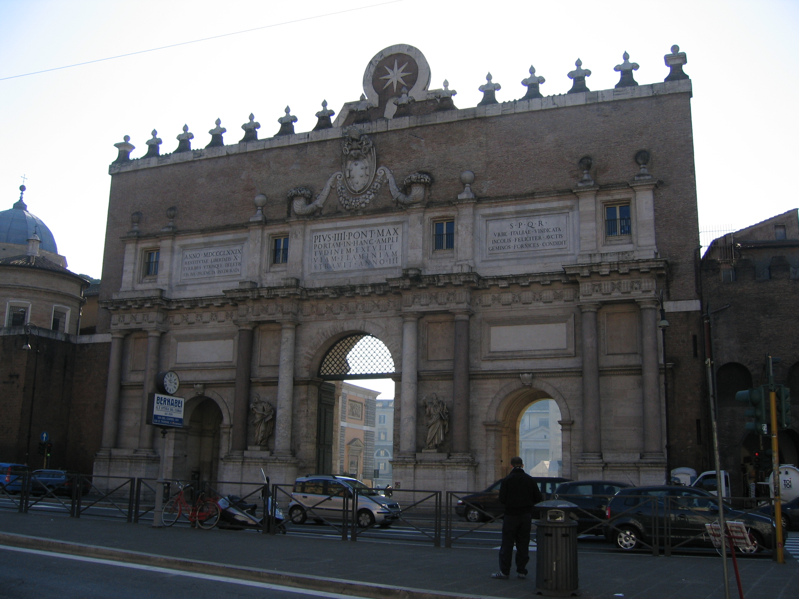 Porta del Popolo